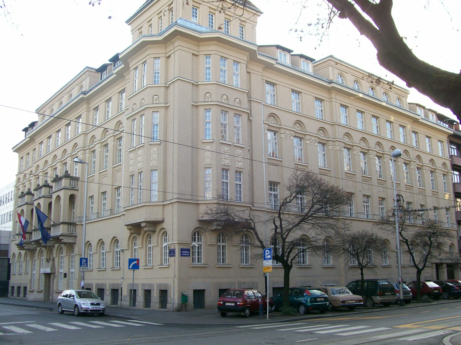 Ministarstvo kulture Republike Hrvatske